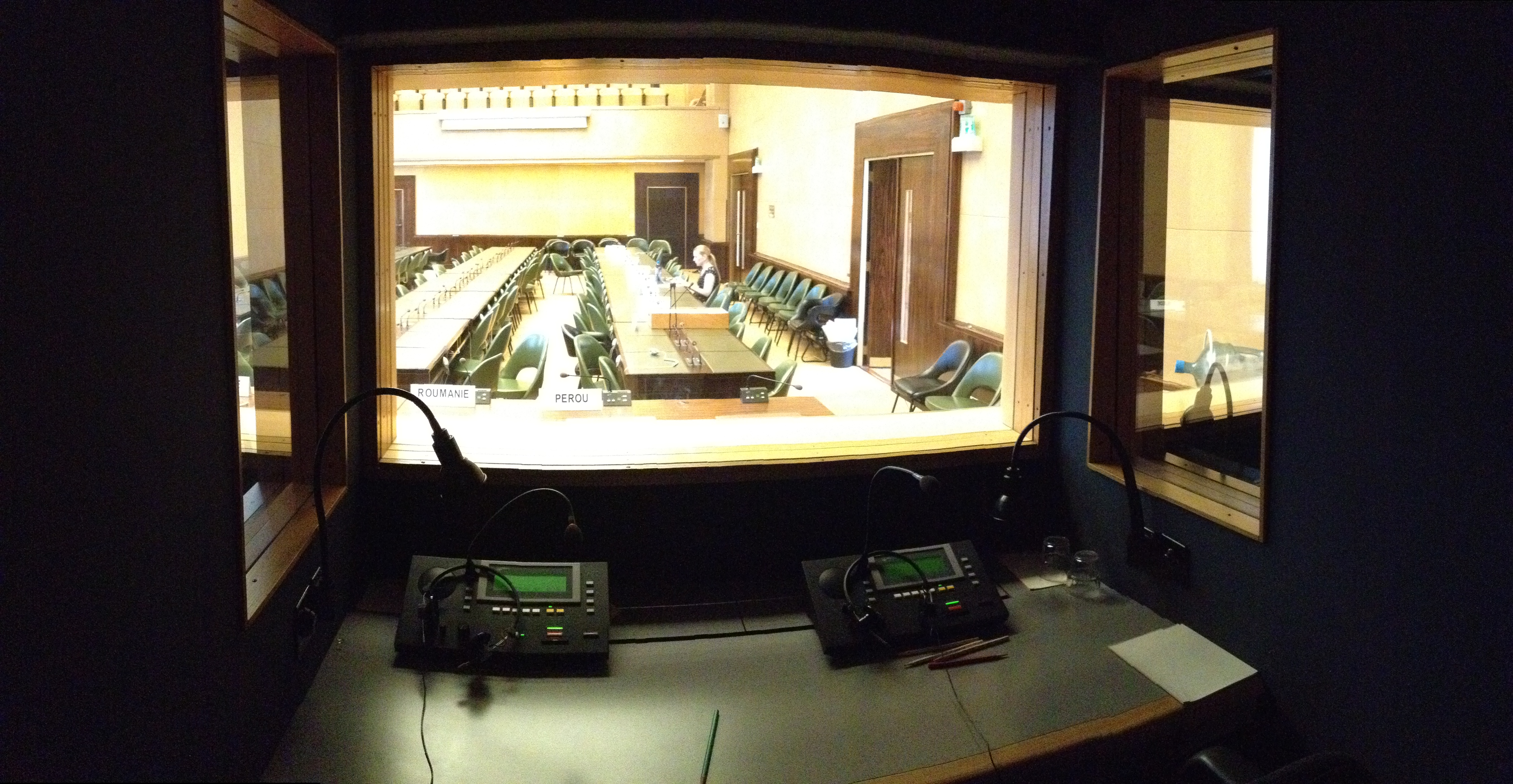 Cabine d'interprétation dans la salle XI au Palais des Nations, à Genève. Dimensions: 1m50 de large, 1m80 de profondeur